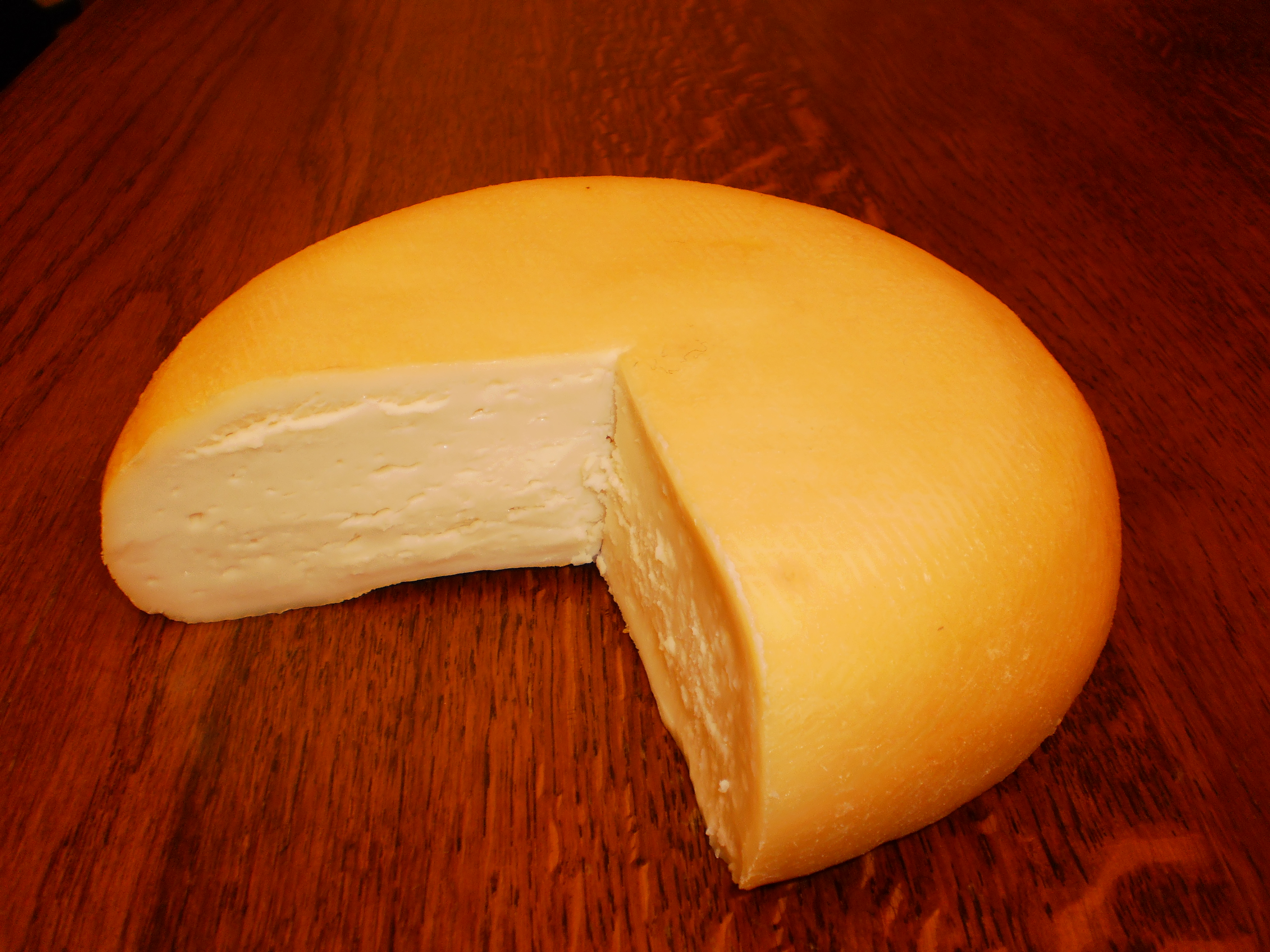 Coupe d'un fromage de la région nantaise (France), le Curé nantais